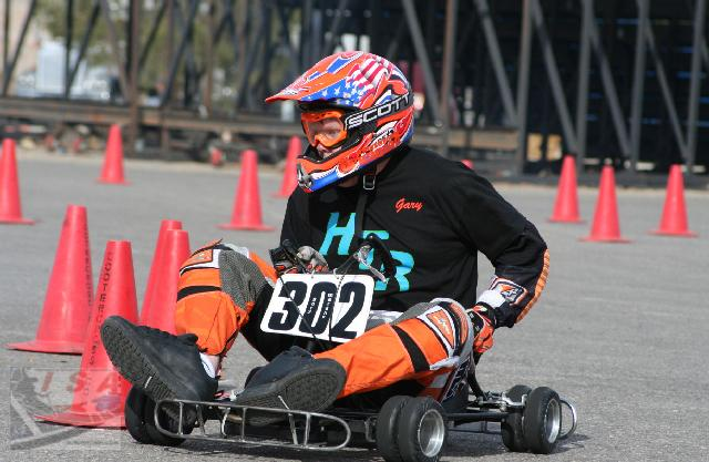 Race Ready Go-Quad